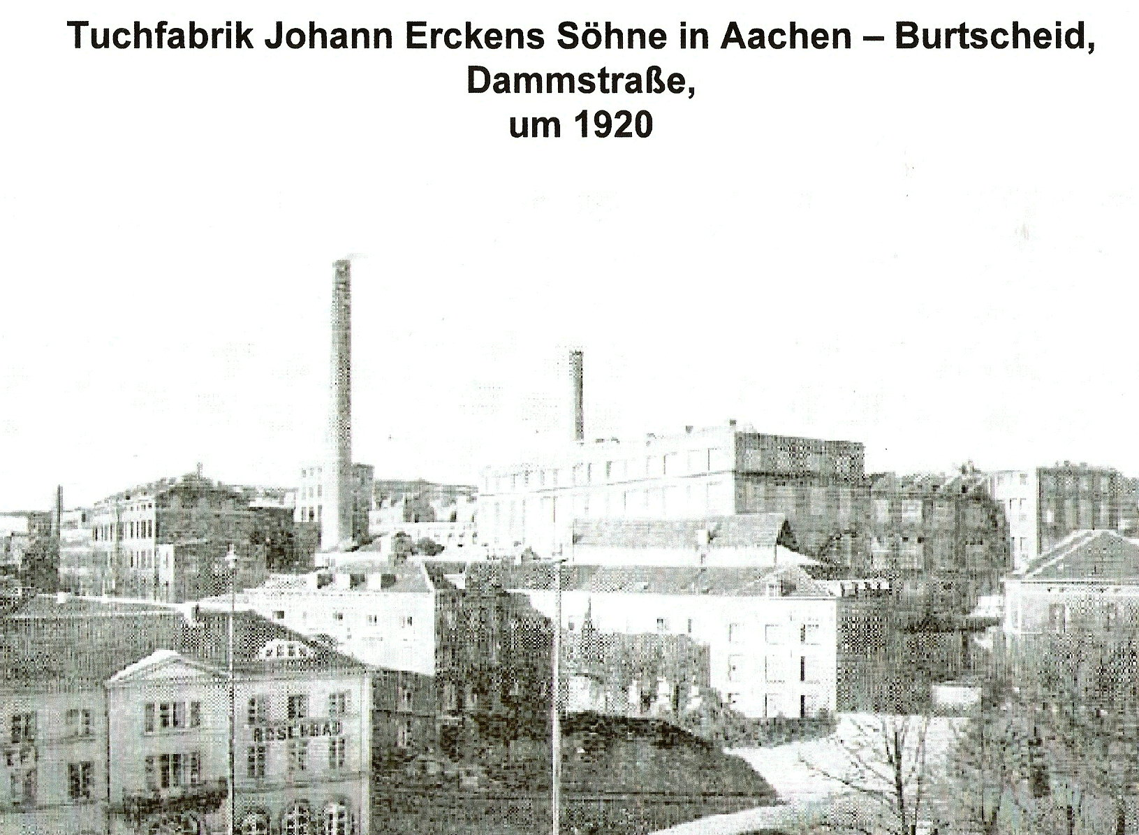 Scan eines Familienfotos